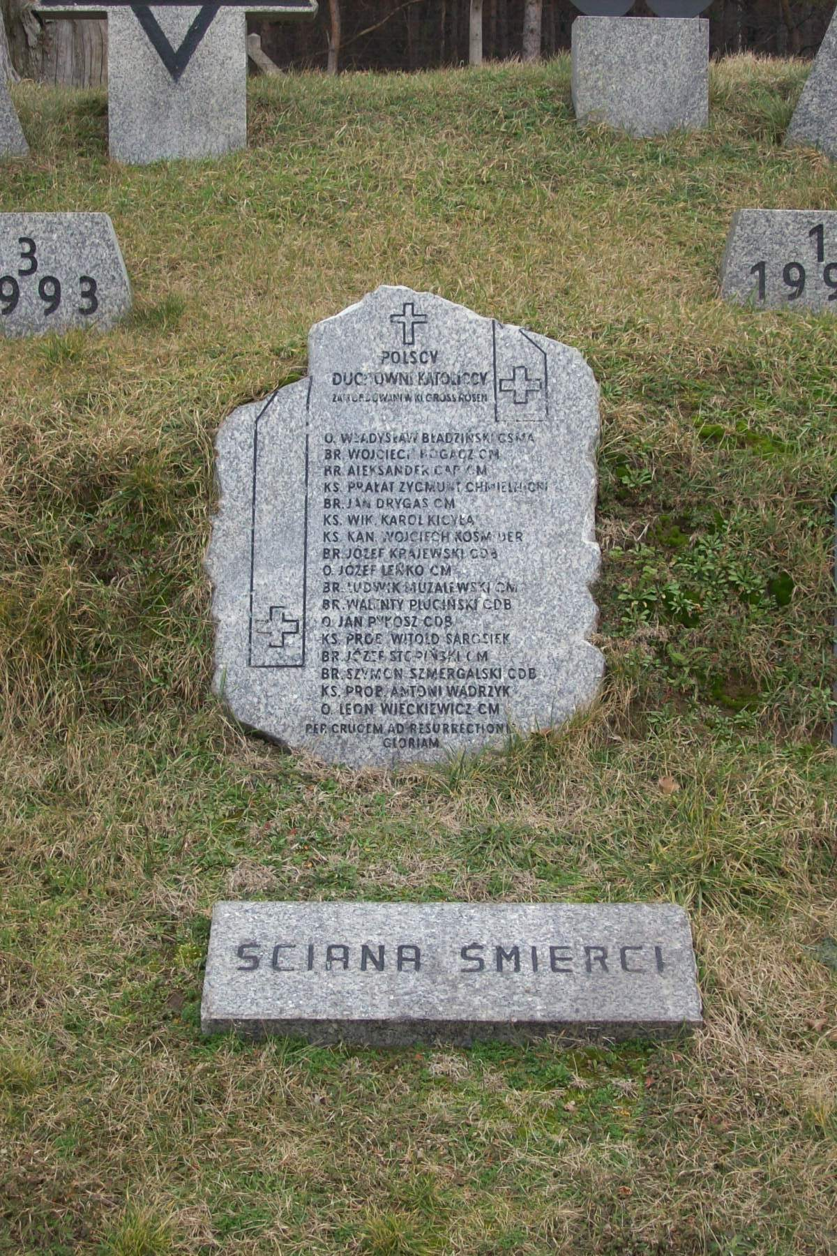 Tablica upamiętniająca w Muzeum Gross-Rosen